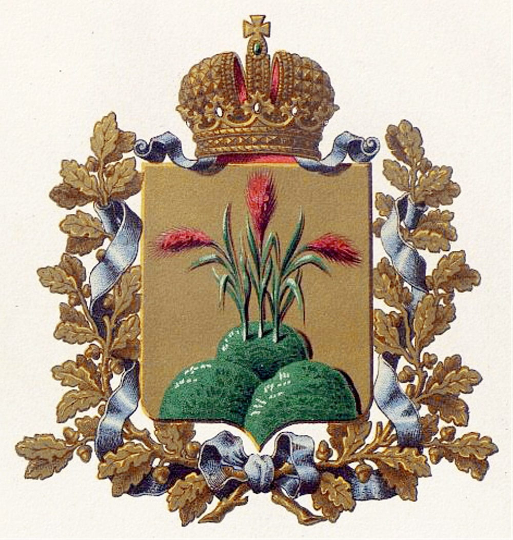 Official Russian Empire coat of arms Mogilev Governorate. Гласный герб Российской Империи Могилёвской губернии в Гербовнике МВД. Утверждён Императором Всероссийским Александром Вторым в 1878 году.